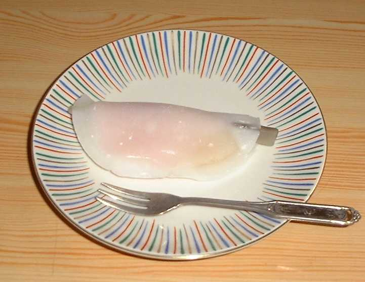 花びら餅(2005年1月投稿者撮影)